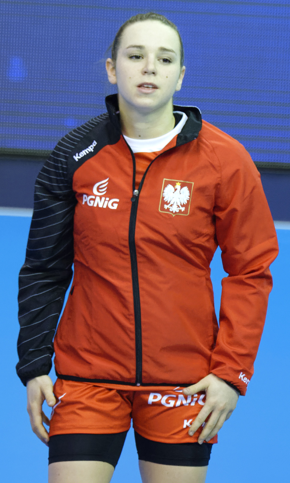 Rencontre en la Pologne et la norvège lors de la golden League de handball. A Dijon, le 19 mars 2015.